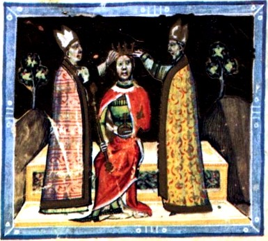 A Képes Krónika (1358) egy lapja, Imre koronázása